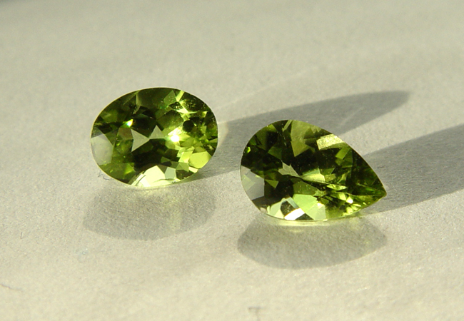 Facettierter Peridot, Varietät der Olivingruppe aus China